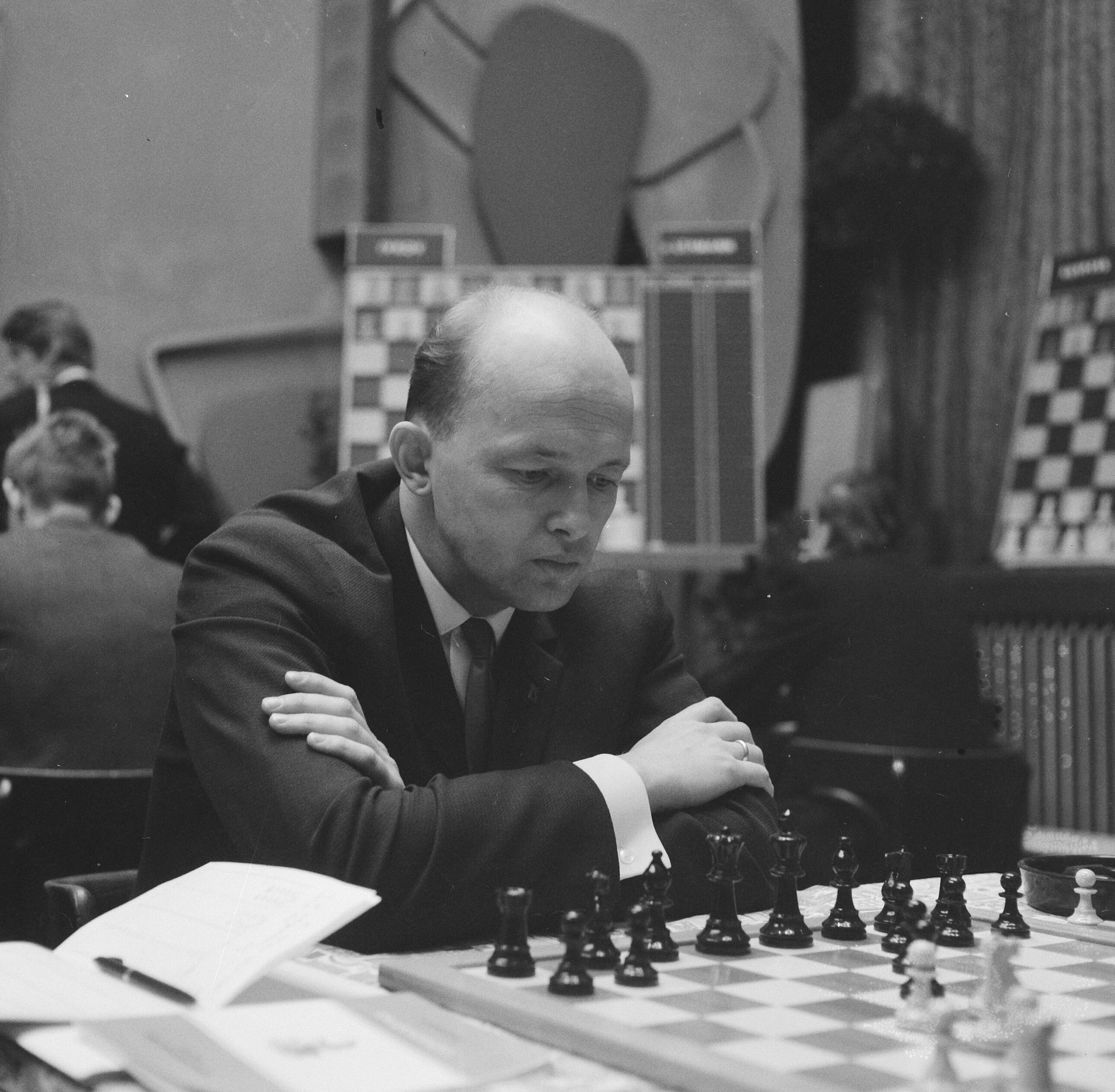 Collectie / Archief : Fotocollectie Anefo Reportage / Serie : [ onbekend ] Beschrijving : 28e Hoogoven schaaktoernooi te Beverwijk, de Rus Nei Datum : 12 januari 1966 Locatie : Beverwijk Trefwoorden : portretten, schaken, sport Persoonsnaam : Nei Iivo Fotograaf : Kroon, Ron / Anefo Auteursrechthebbende : Nationaal Archief Materiaalsoort : Negatief (zwart/wit) Nummer archiefinventaris : bekijk toegang 2.24.01.03 Bestanddeelnummer : 918-6662